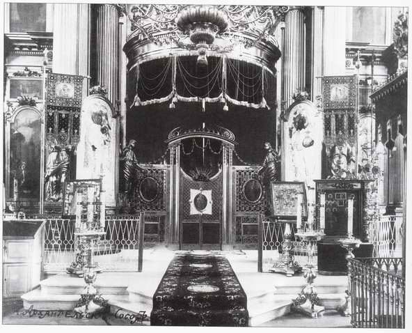 г. Архангельск. Троицкий собор. Алтарь. Фото В. А. Плотникова. Около 1909 г. Институт истории материальной культуры Российской Академии наук.